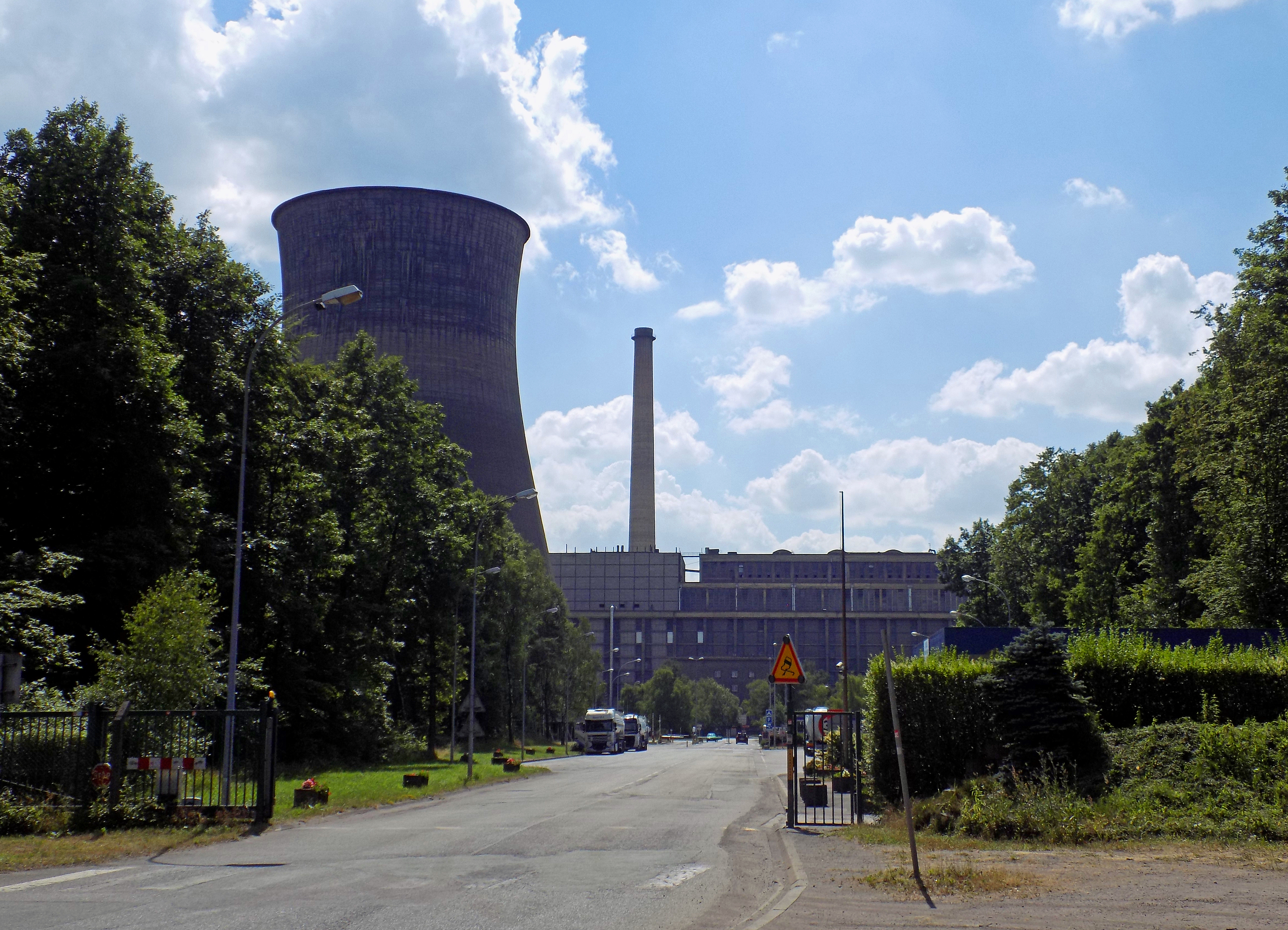 La Centrale électrique Émile Huchet de Carling - Saint-Avold, mise en service en 1958 est restée depuis les années 1960 l'une des plus grosses centrales thermiques de France (1 873 MW avec trois tranches charbon de 115 MW (tranche 4), 330 MW (tranche 5) et 600 MW (tranche 6). Deux tranches (7 et 8) CCGT de 414 MW chacune, mises en service en mars 2010.